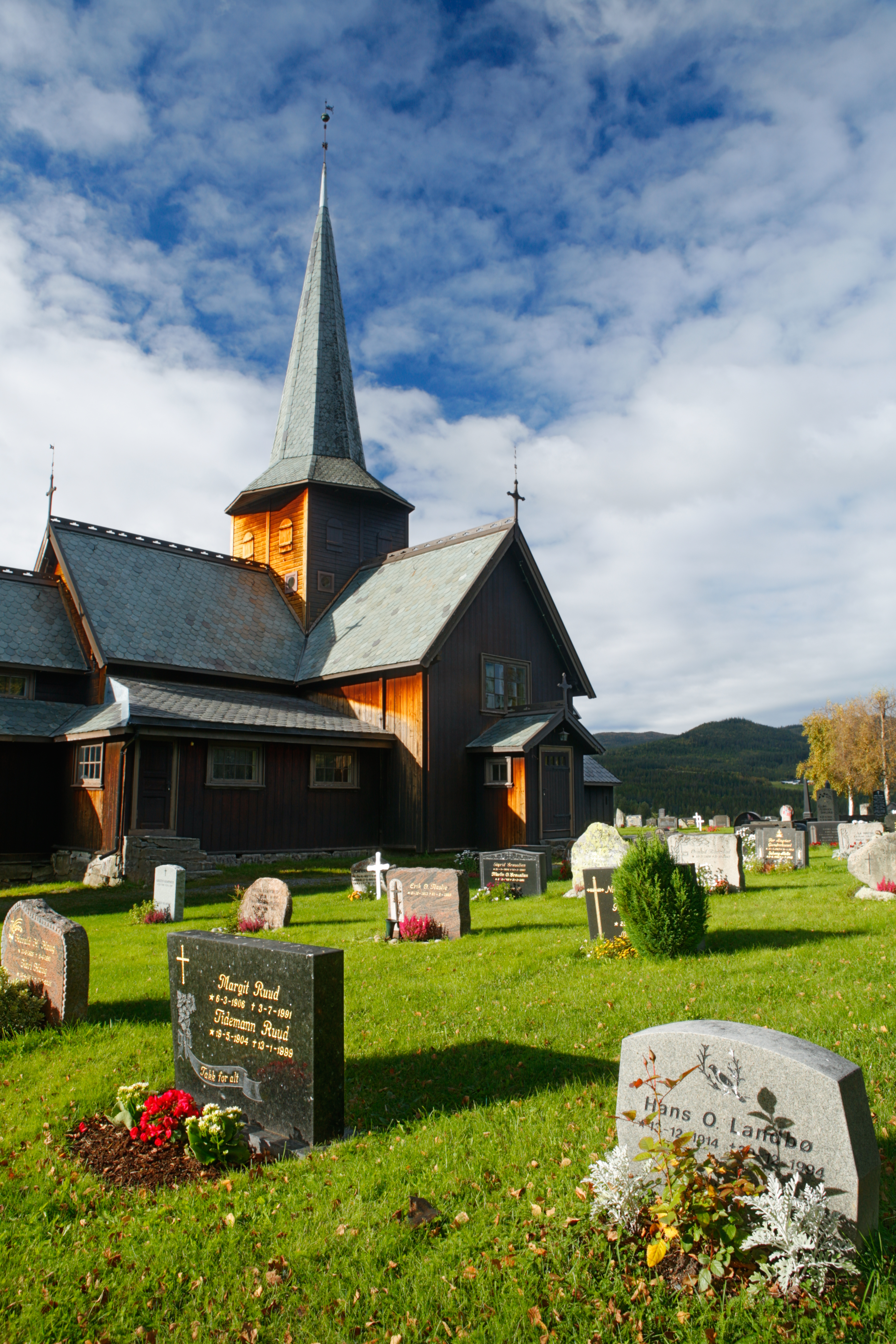 Hedalen stavkirke sett fra kirkegården, en fin dag i september.